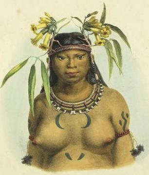 Mulher da etnia Mongoió